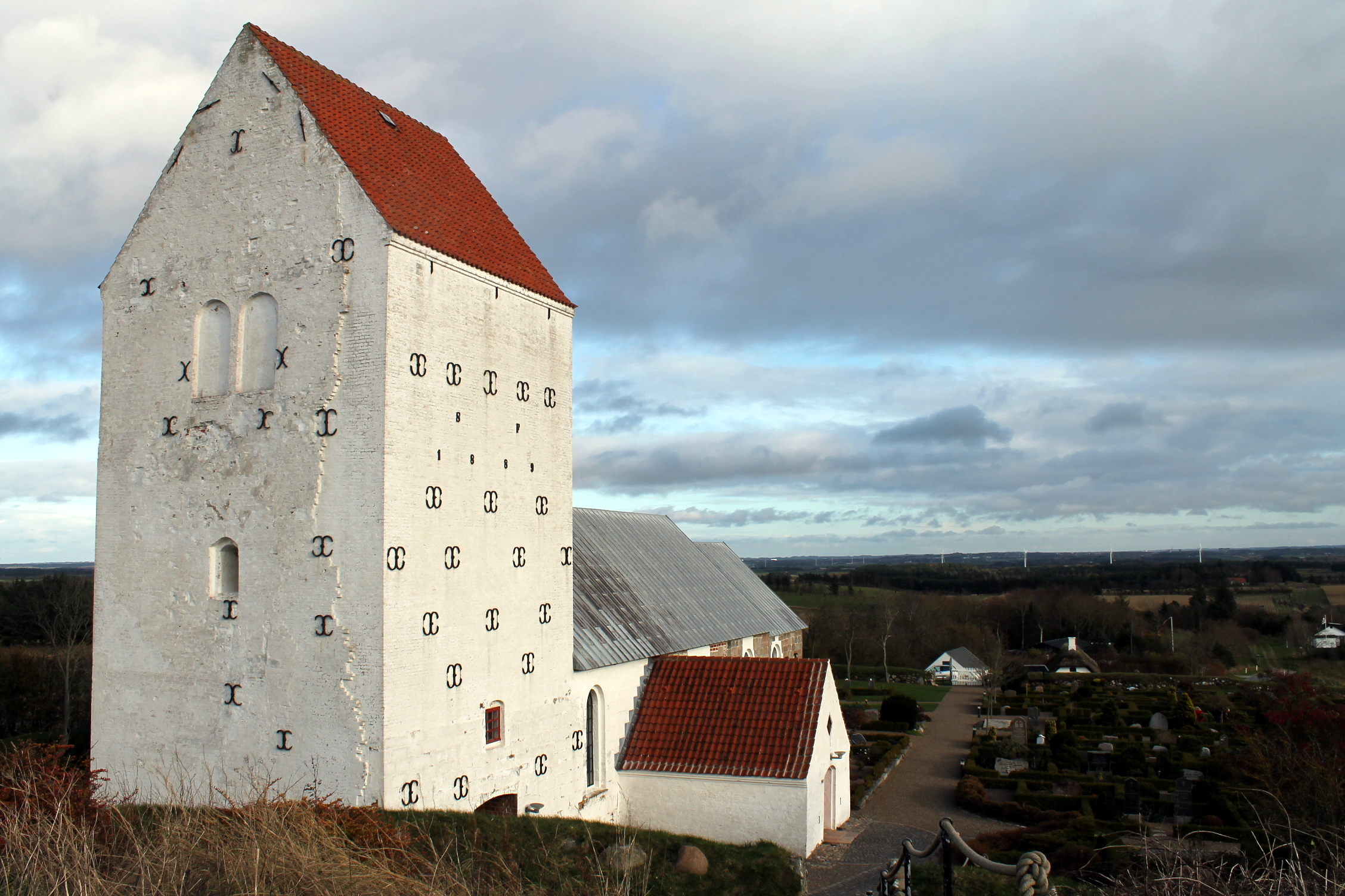 Vennebjerg Kirke, Nordjylland